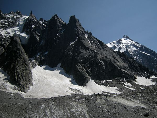 Aiguille des Deux Aigles, pointe des Pélerins, aiguille des Pélerins, aiguille du Peigne (au centre) et au fond à droite, l'aiguille du Midi